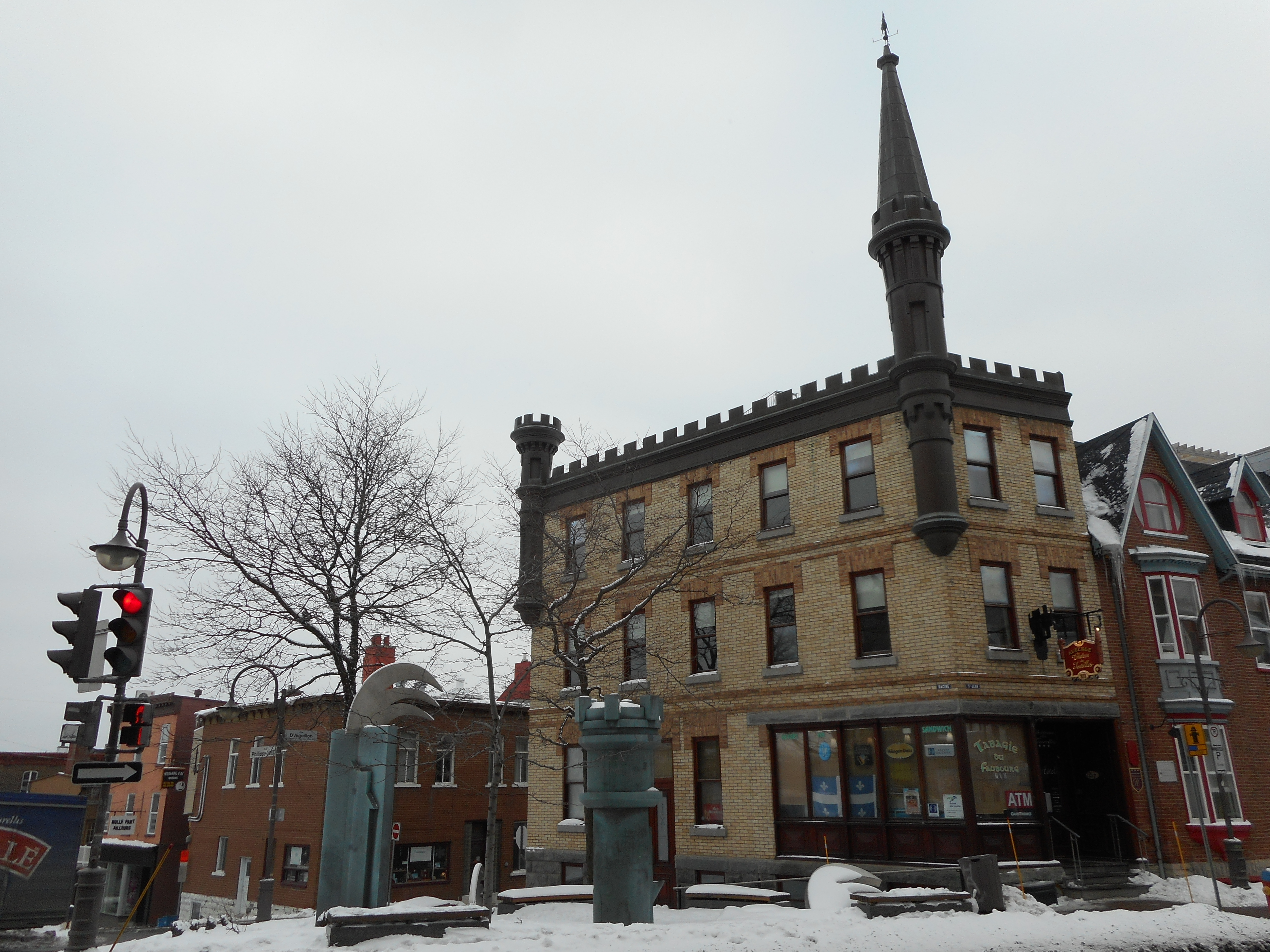 210, rue Saint-Jean, Québec